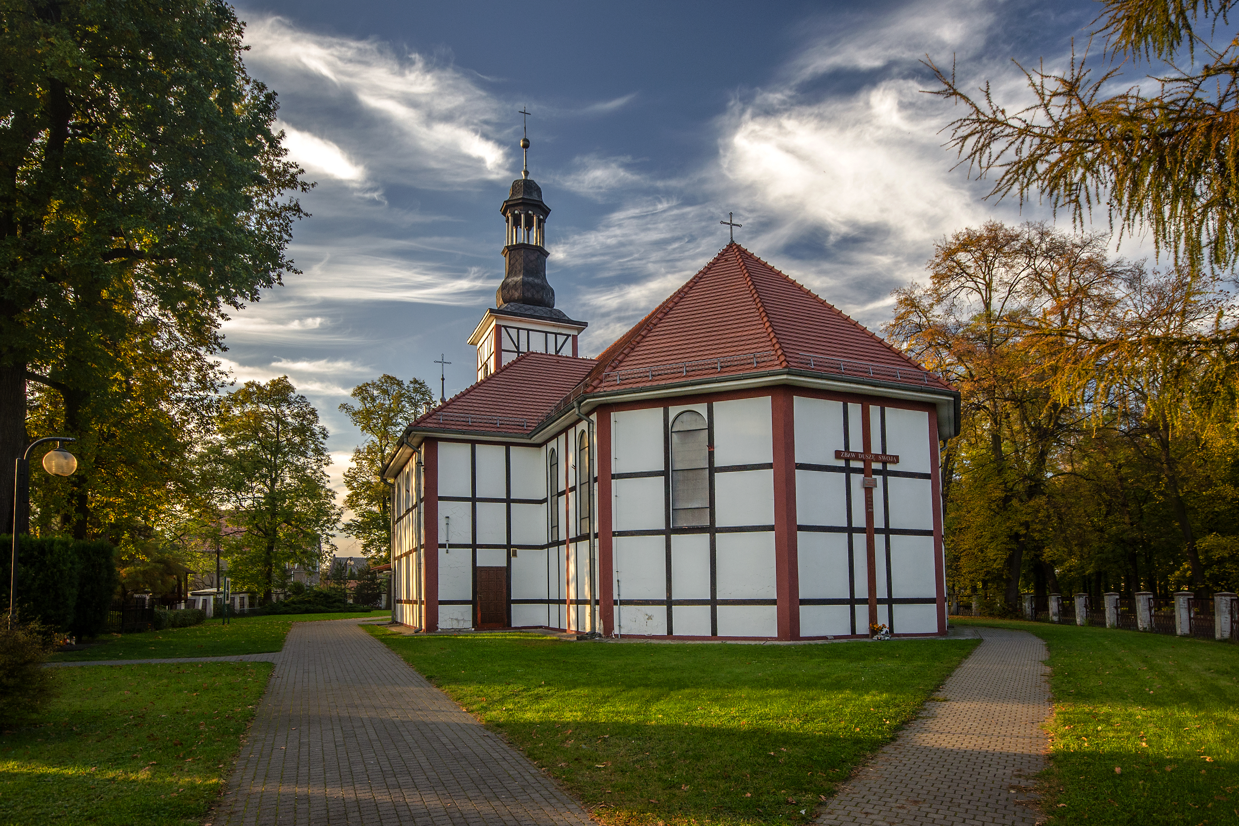 Jelcz-Laskowice, kościół par. p.w. św. Stanisława, XVII